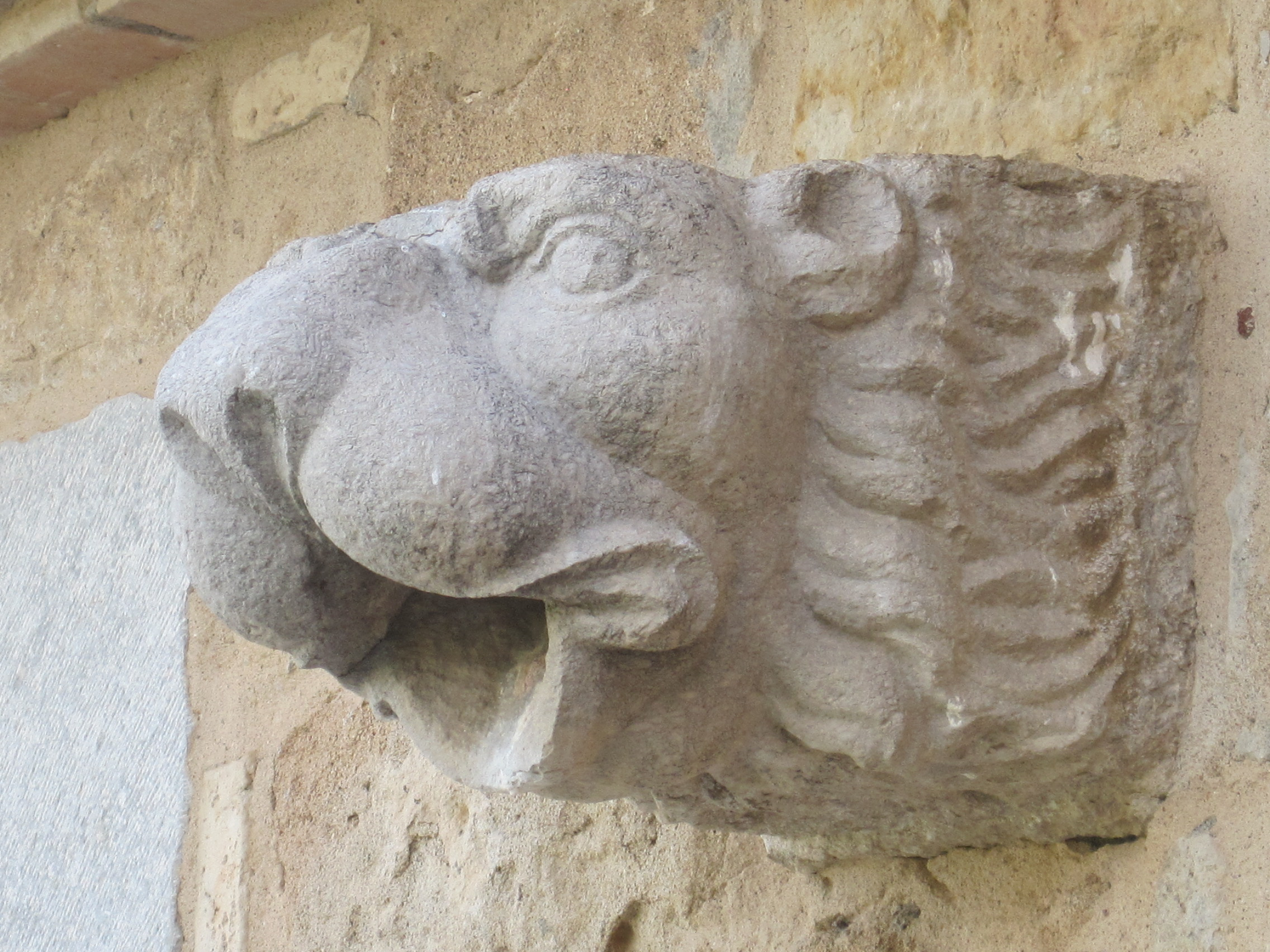 Gàrgola que representa un lleó.